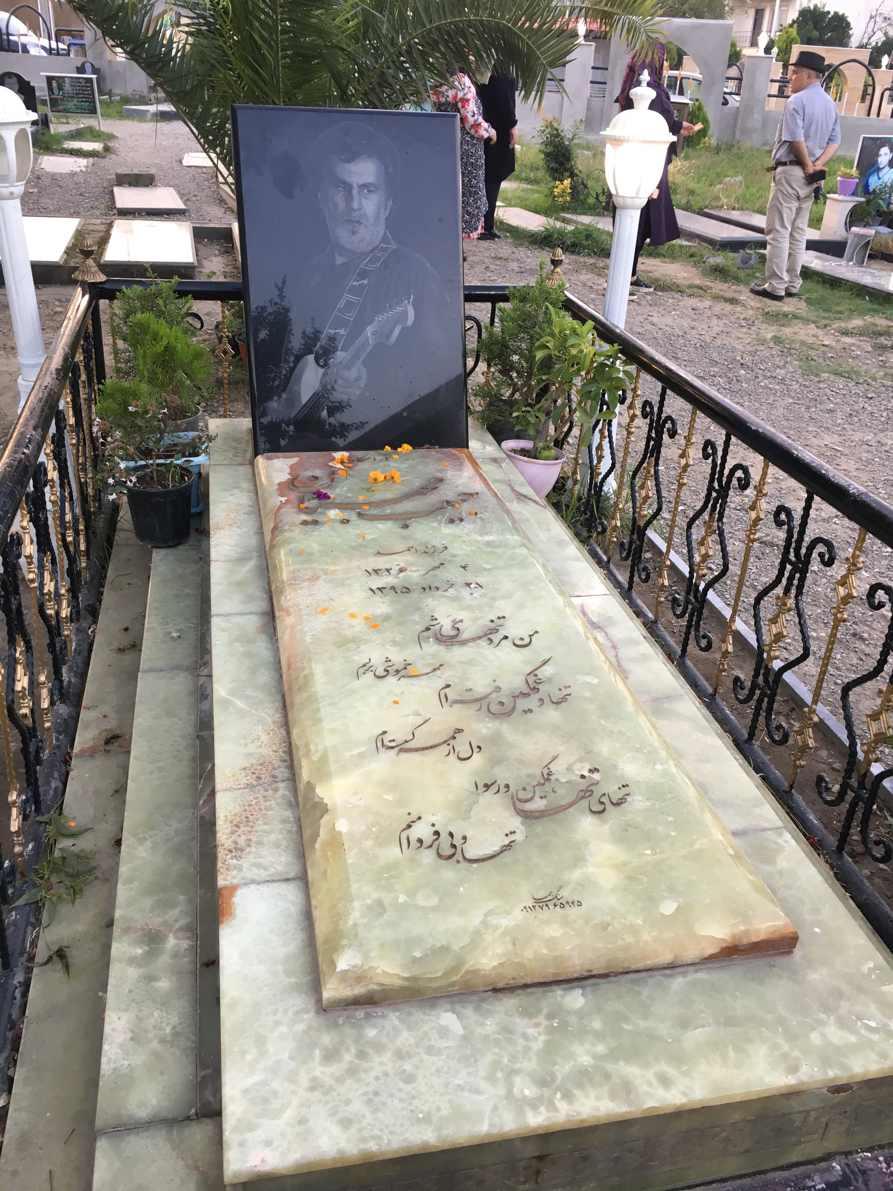 آرامگاه حبیب